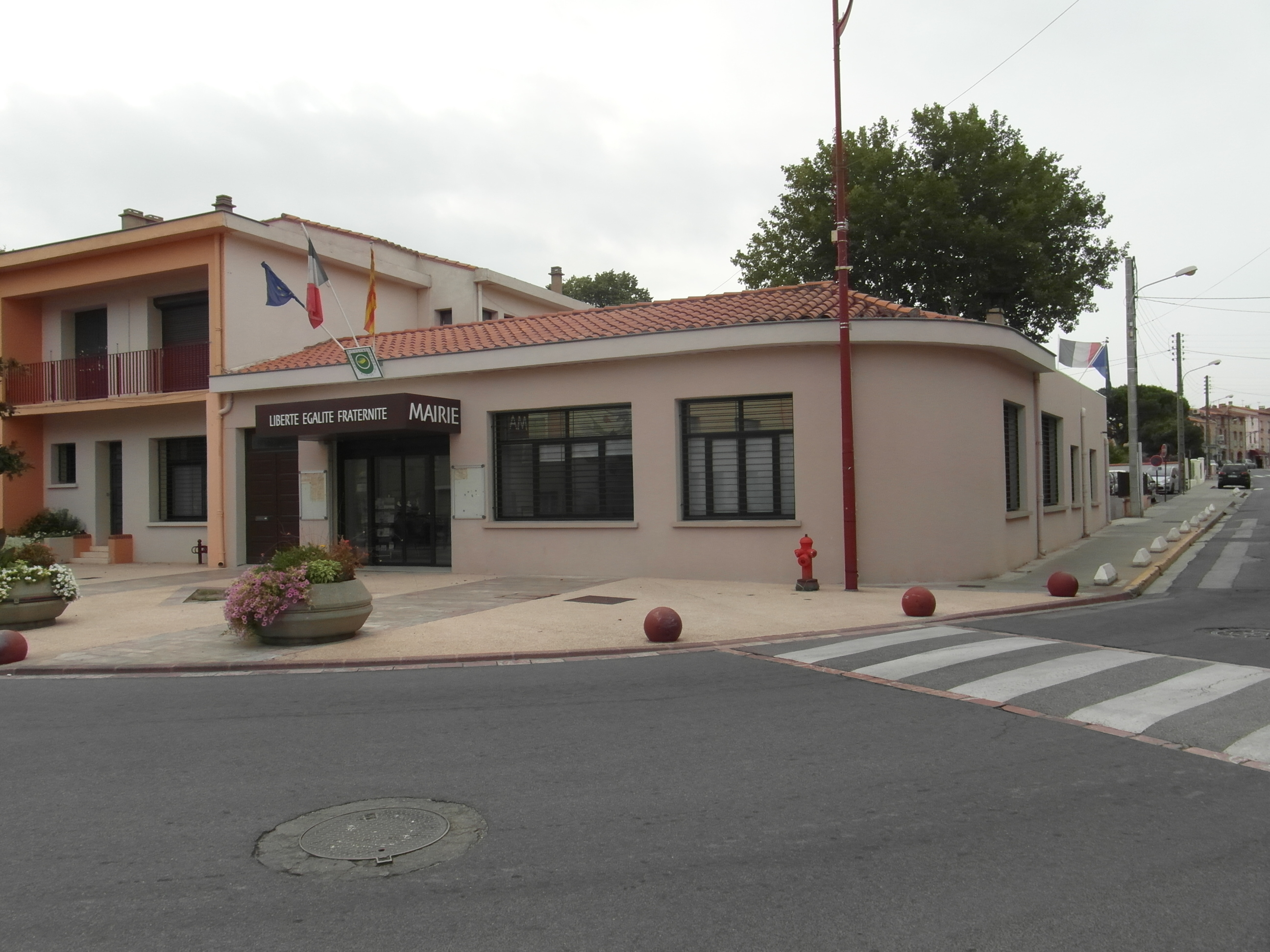 Mairie de Toulouges